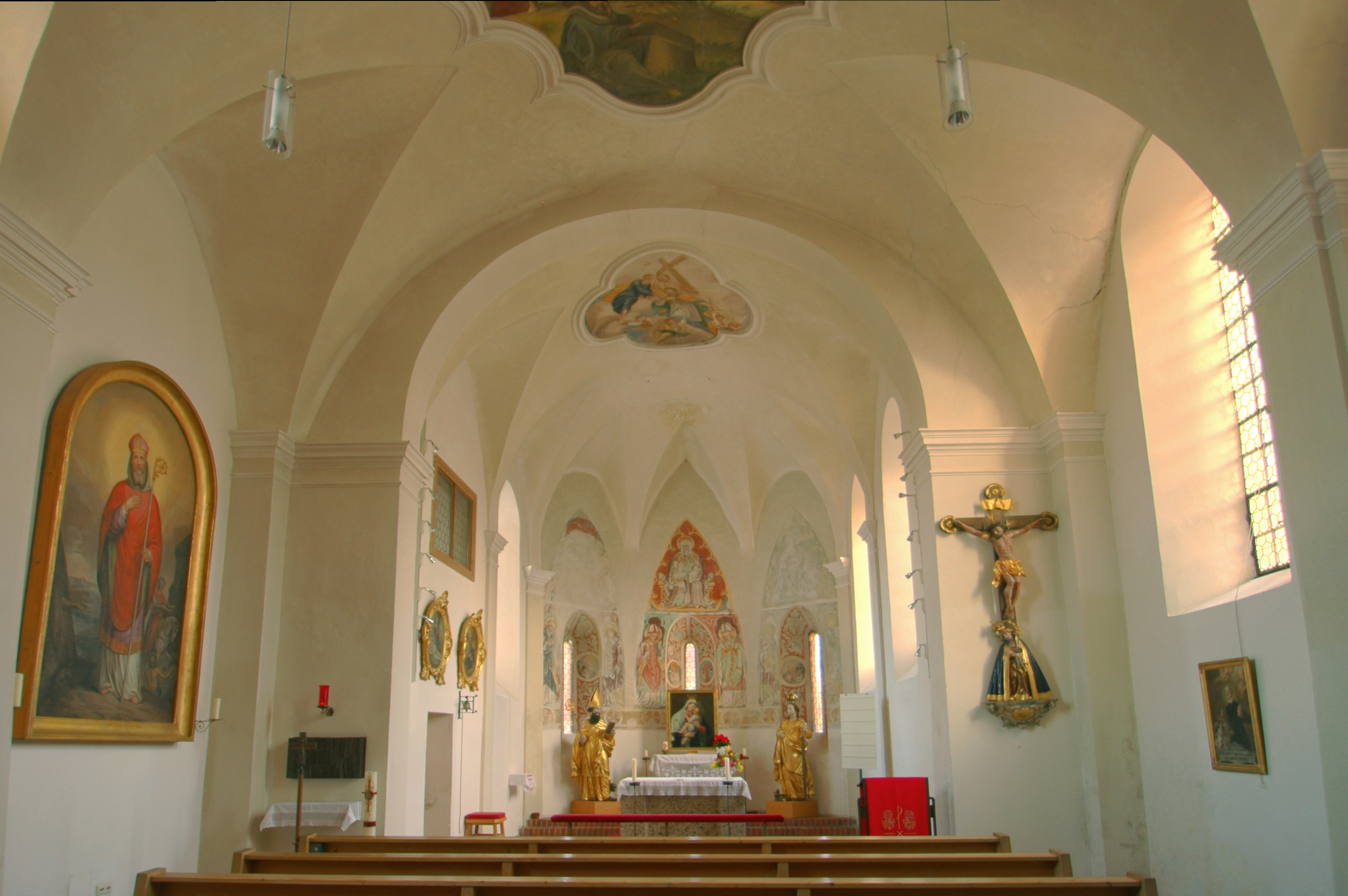 Kath. Pfarrkirche St. Martin, Högling (Bruckmühl), Chor und Langhaus um 1300, barocker Ausbau 1. Hälfte 18. Jh., Turm spätgotischThis is a photograph of an architectural monument.